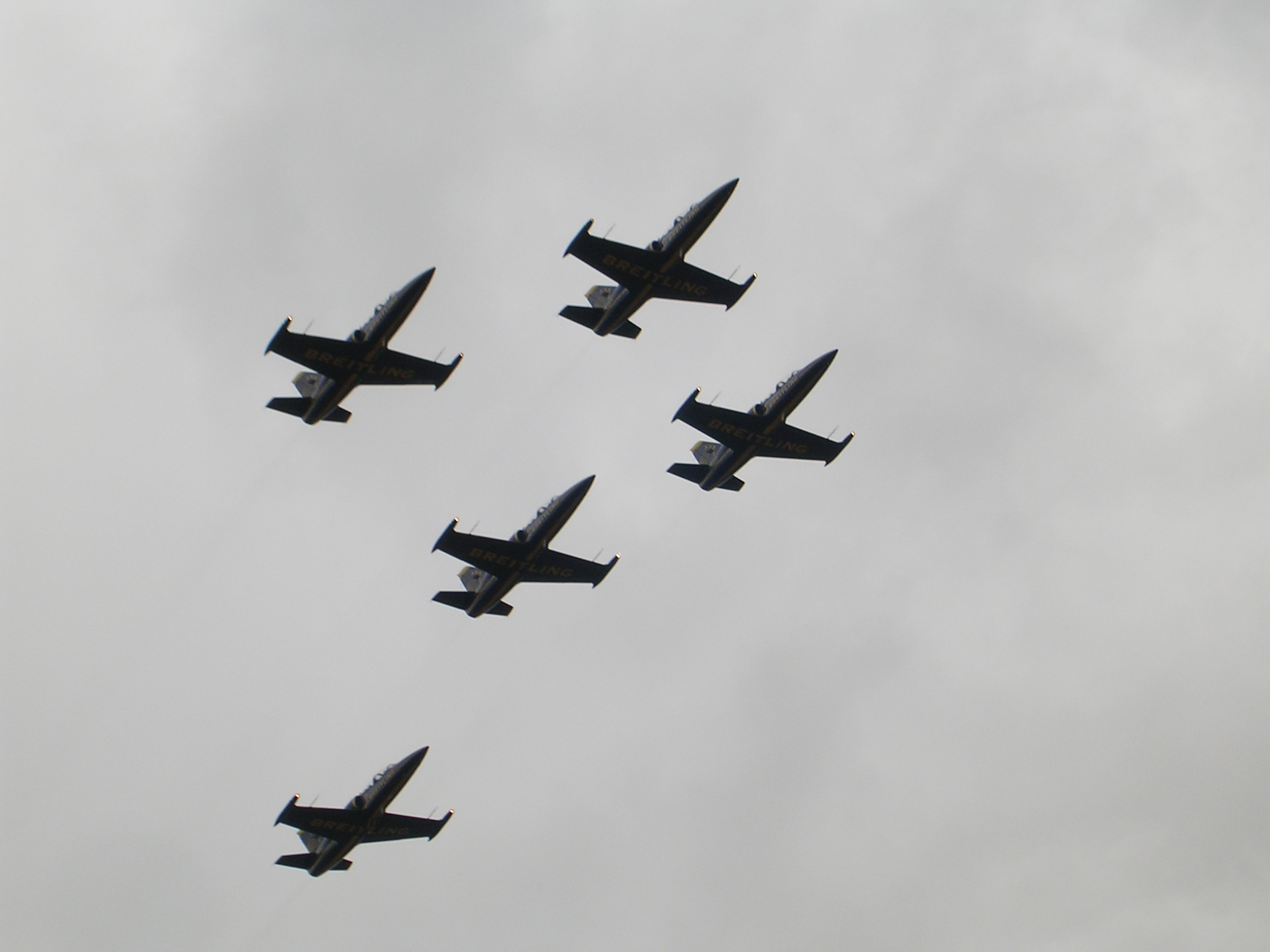 Breitling jet team, Duxford UK, September 2005